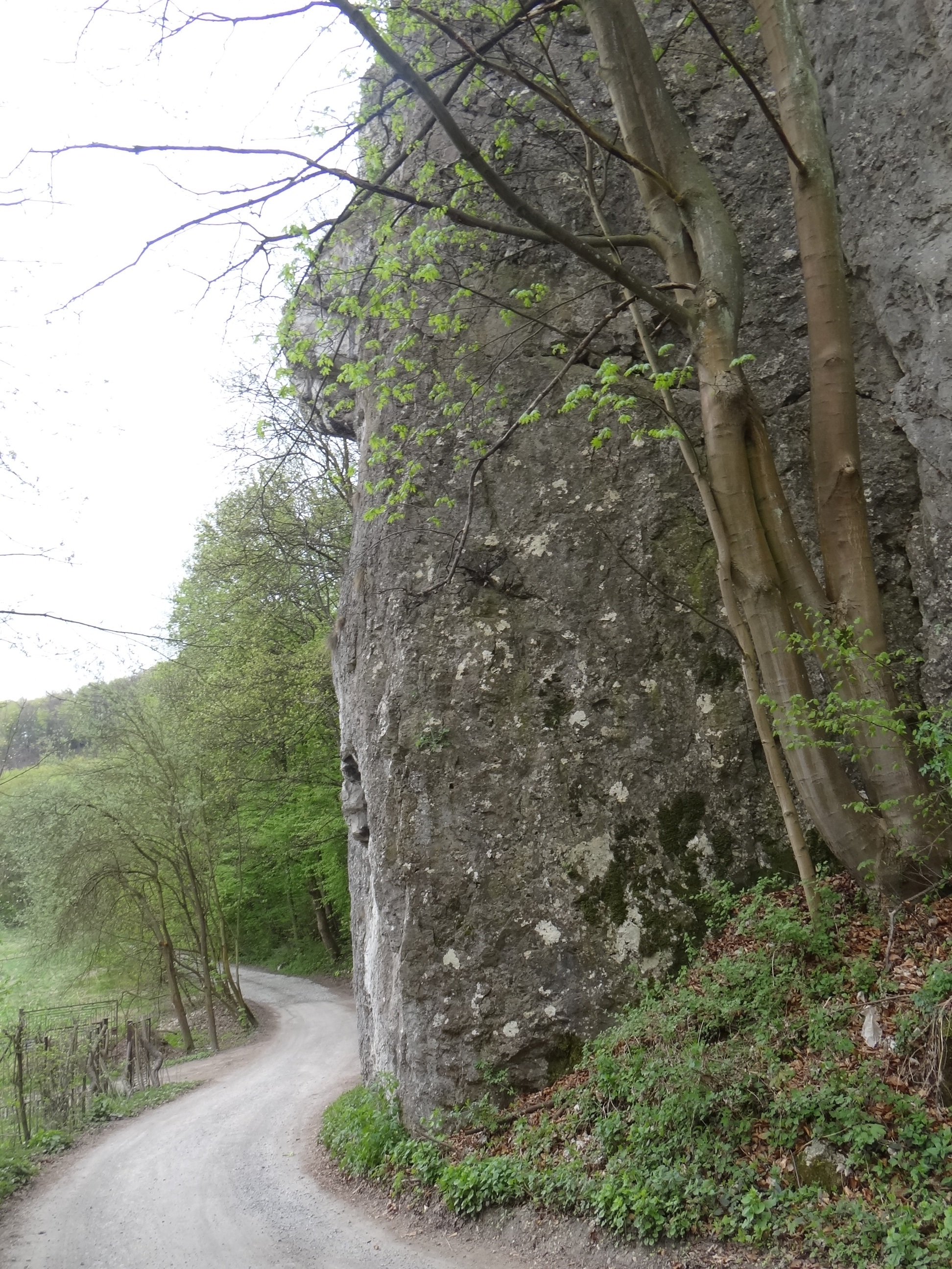 Skała Golanka w Ojcowskim Parku Narodowym